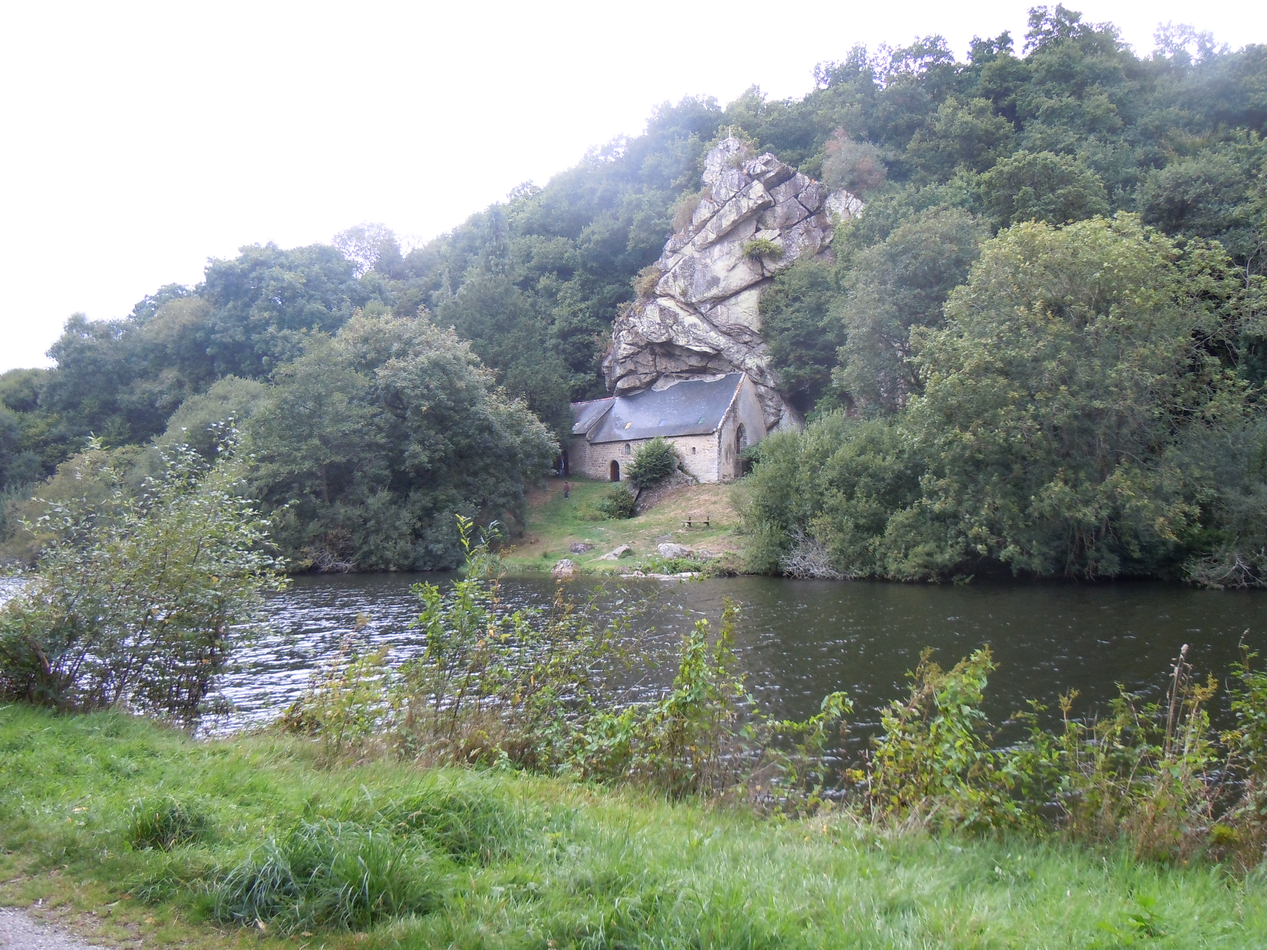 Le Blavet et la chapelle Saint Gildas de Bieuzy (Morbihan)